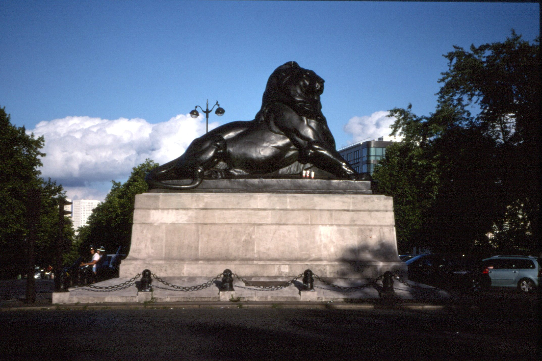 Le Lion de Belfort, Paris